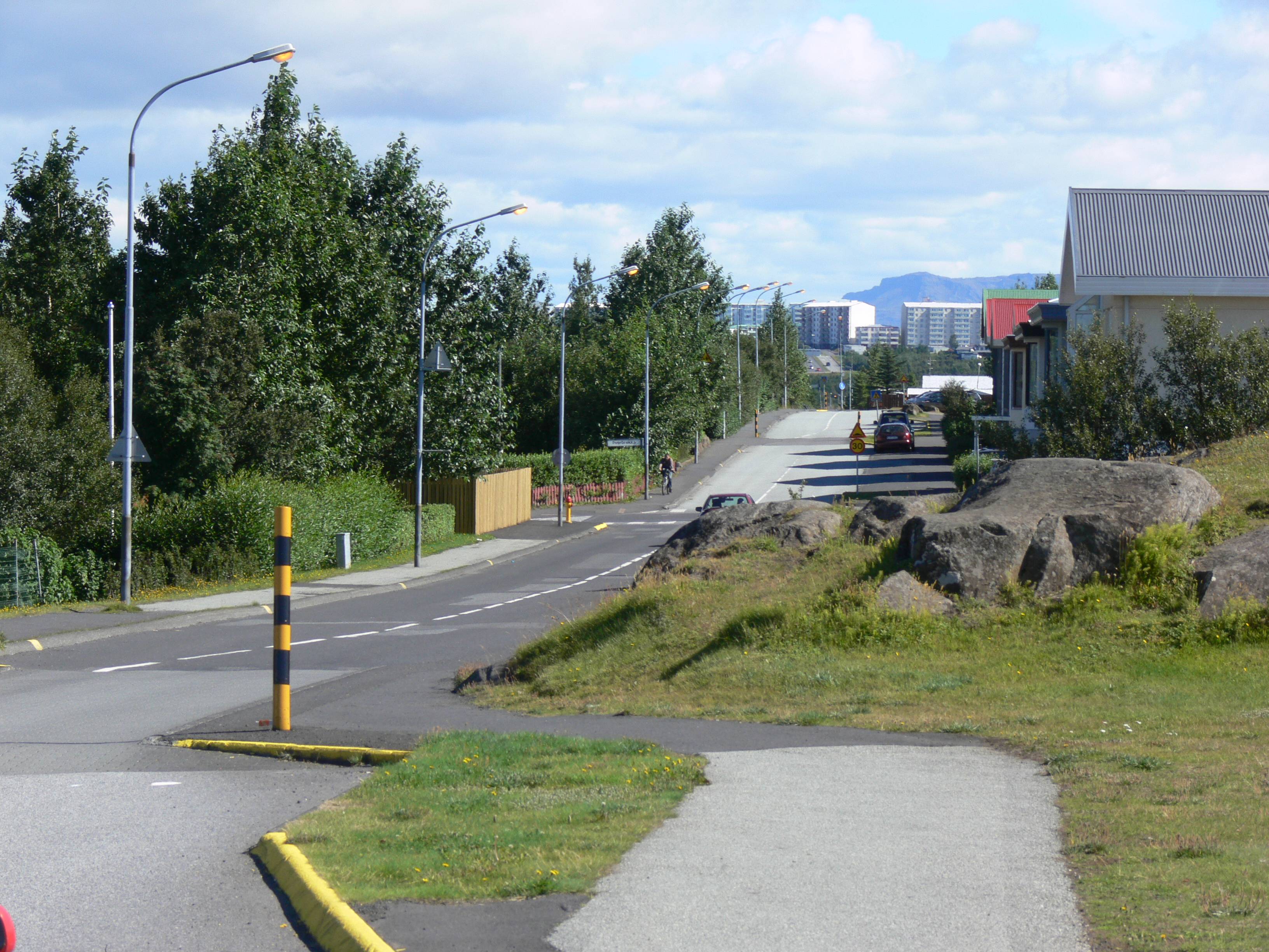 Álfhóllinn in Kópavogur bei Álfholsvegur 125. Hier sollen Elfen wohnen, weshalb die Straße hier verengt wird.